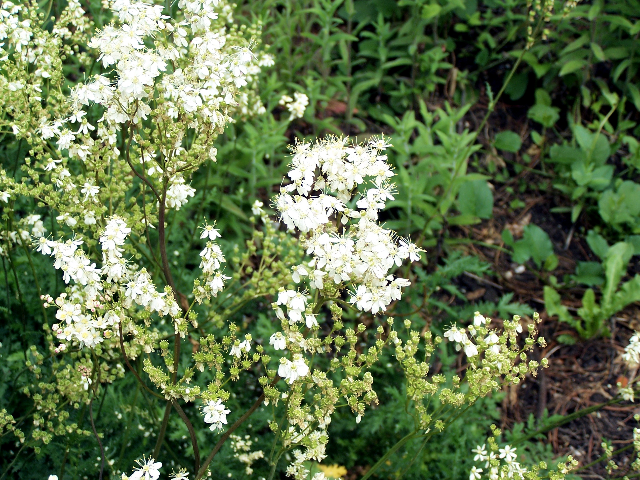 Filipendula vulgaris 17 juin 2006 Vieux jardin botanique de Göttingen